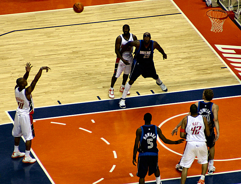 Freiwurf Charlotte Bobcats beim NBA Spiel gegen die Mavericks in Charlotte.